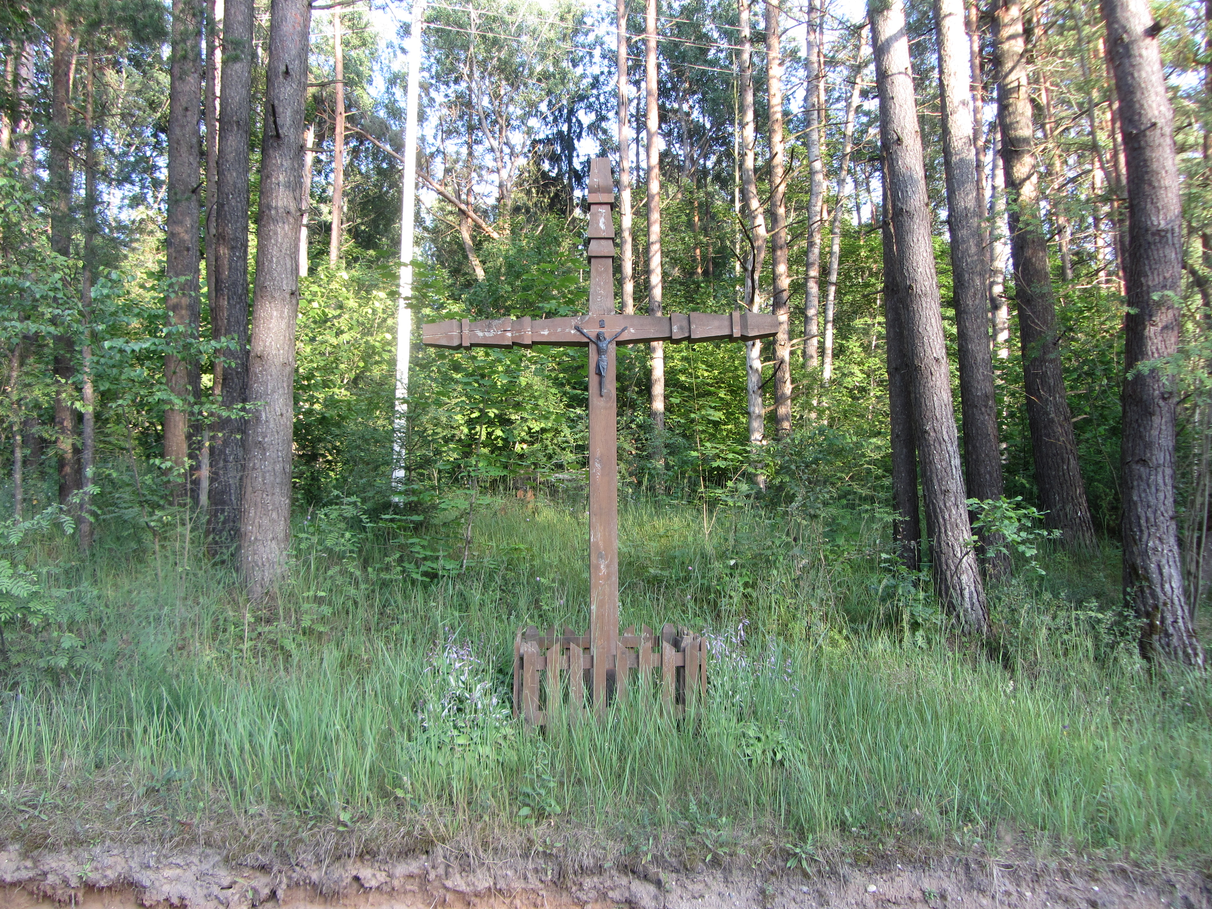 Salako sen., Lithuania